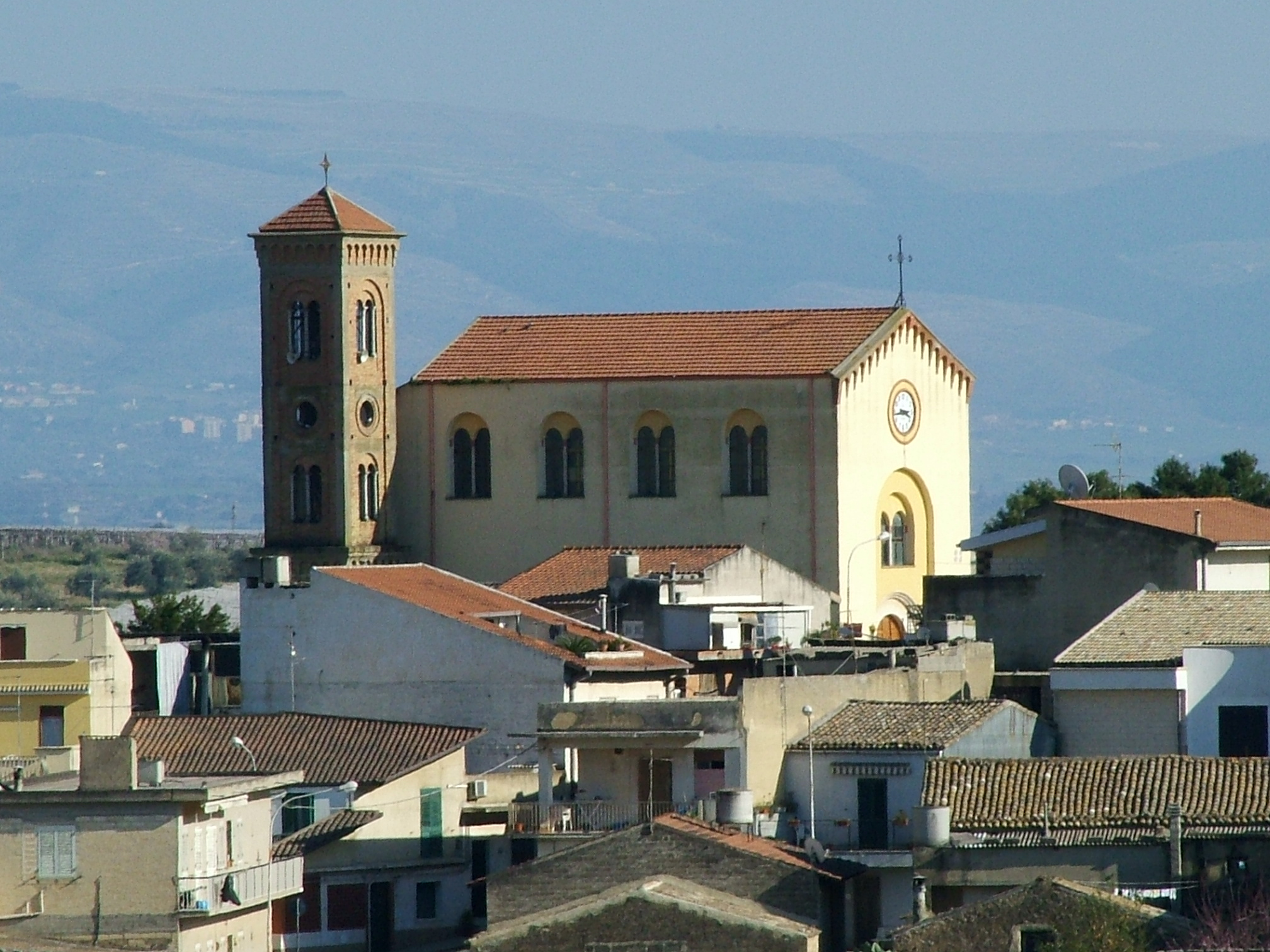 Autore: Rosario Vizzini Panorama di Granieri con la chiesa parrocchiale in primo piano. Anno: 2005